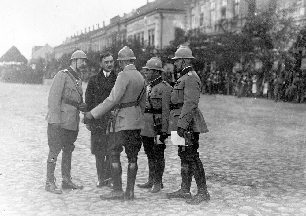 King Ferdinand discussing with Iuliu Maniu, generals Prezan, Mărdărescu and Panaitescu at Bekes Csaba.